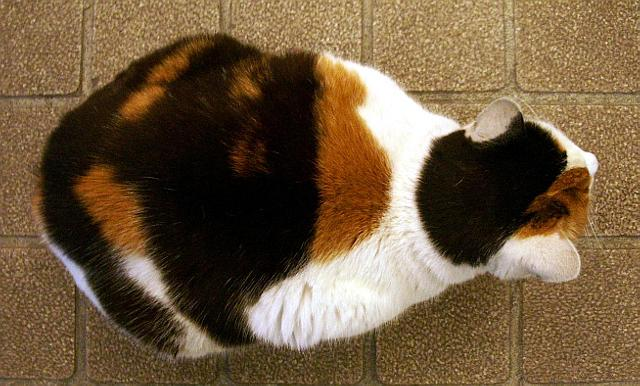 Maneki neko taken from ja wiki